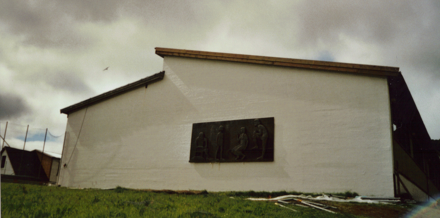 Bronzerelief des bedeutendsten Künstlers der Färöer, Janus Kamban, an der Schule in Götugjógv